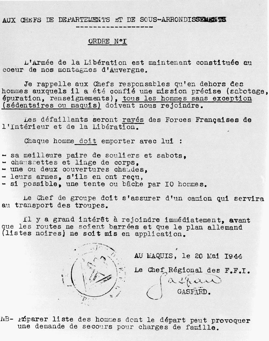 Ordre de Mobilisation des Maquis d'Auvergne, 2 mai 1944, Colonel Gaspard, Émile Coulaudon